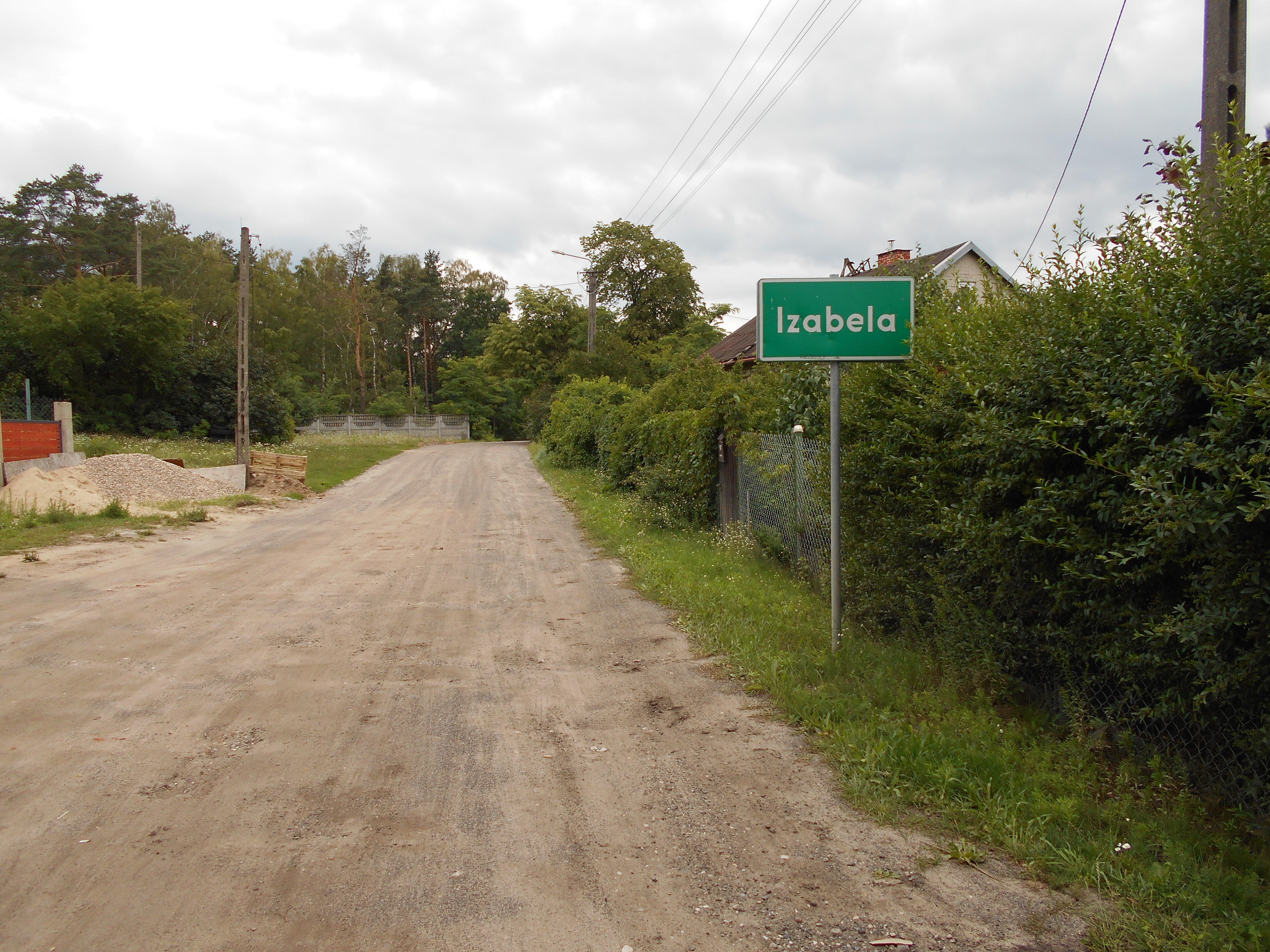 Miejscowość w gminie Wiązowna